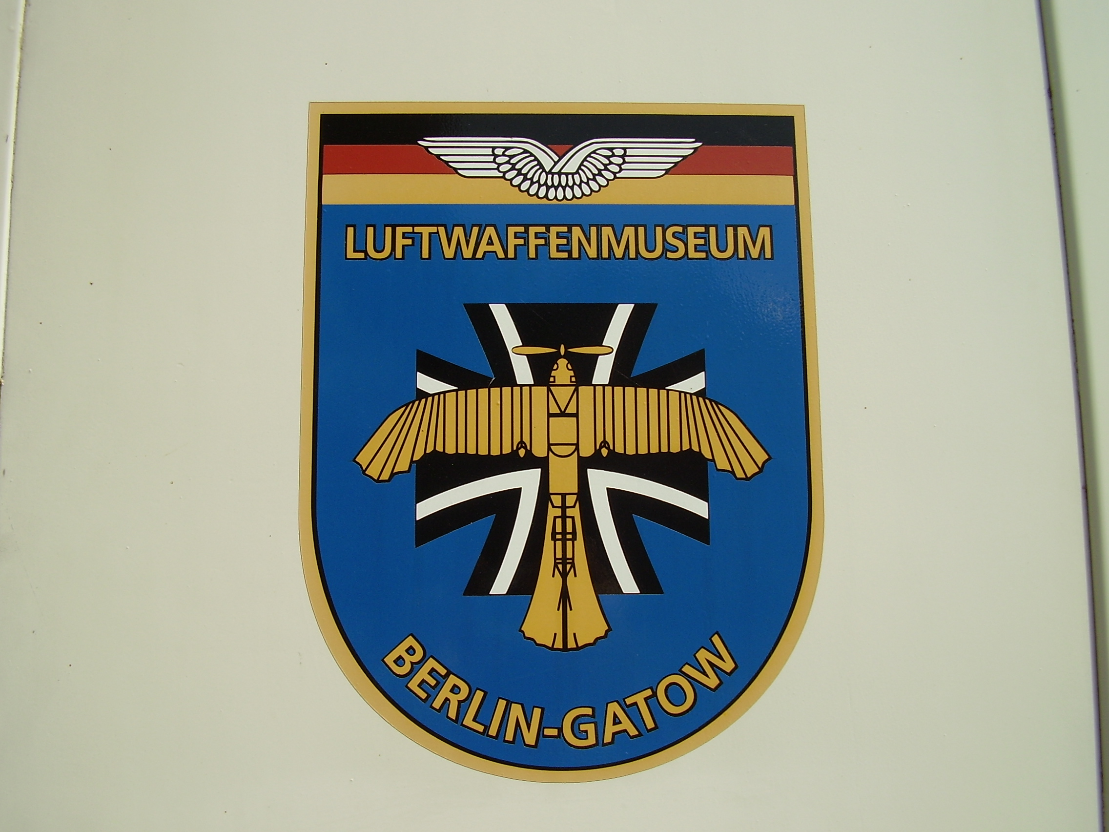 ILA 2008